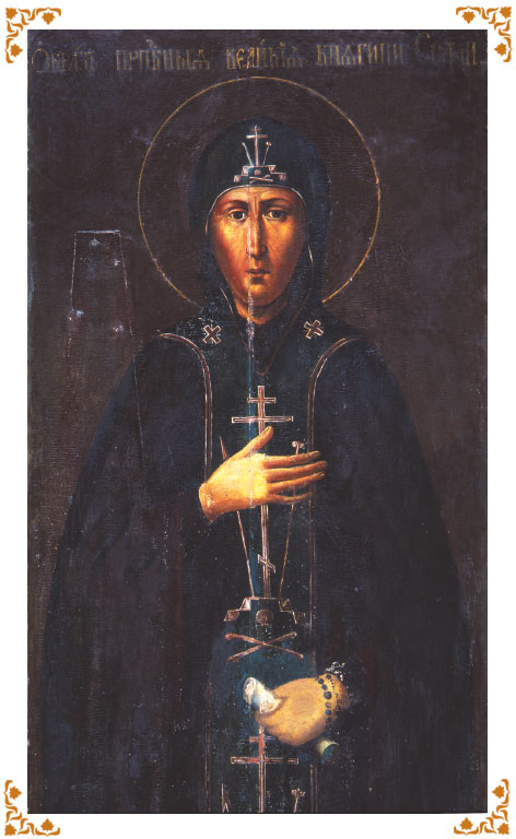 Преподобная София Суздальская. Икона из покровского монастыря, суздаль